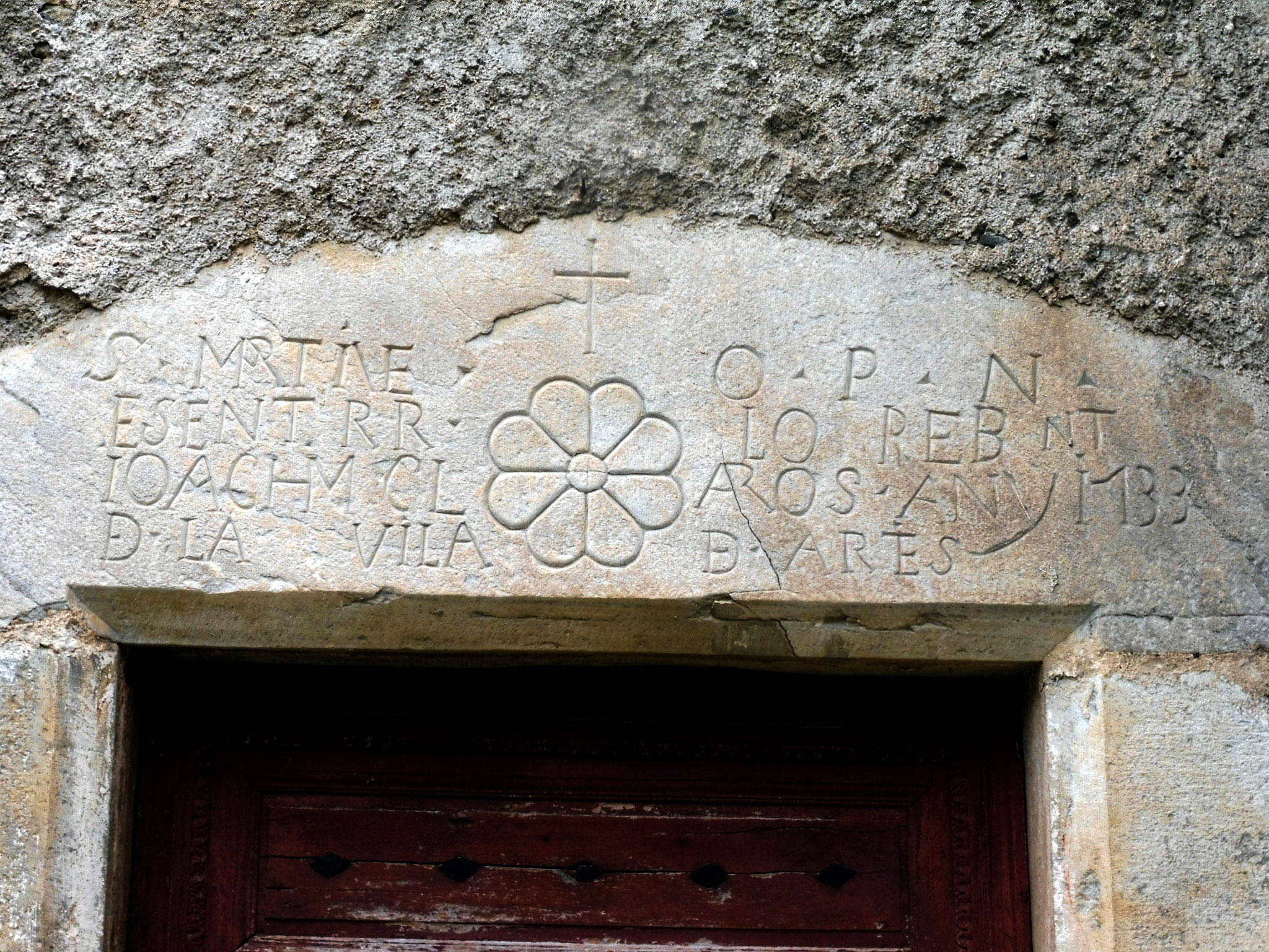 Església de Sant Martí de Benós (es Bòrdes): llinda del portal